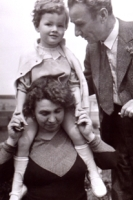 Г. А. Мусатов с женой и дочерью. Фото 1934–1935.